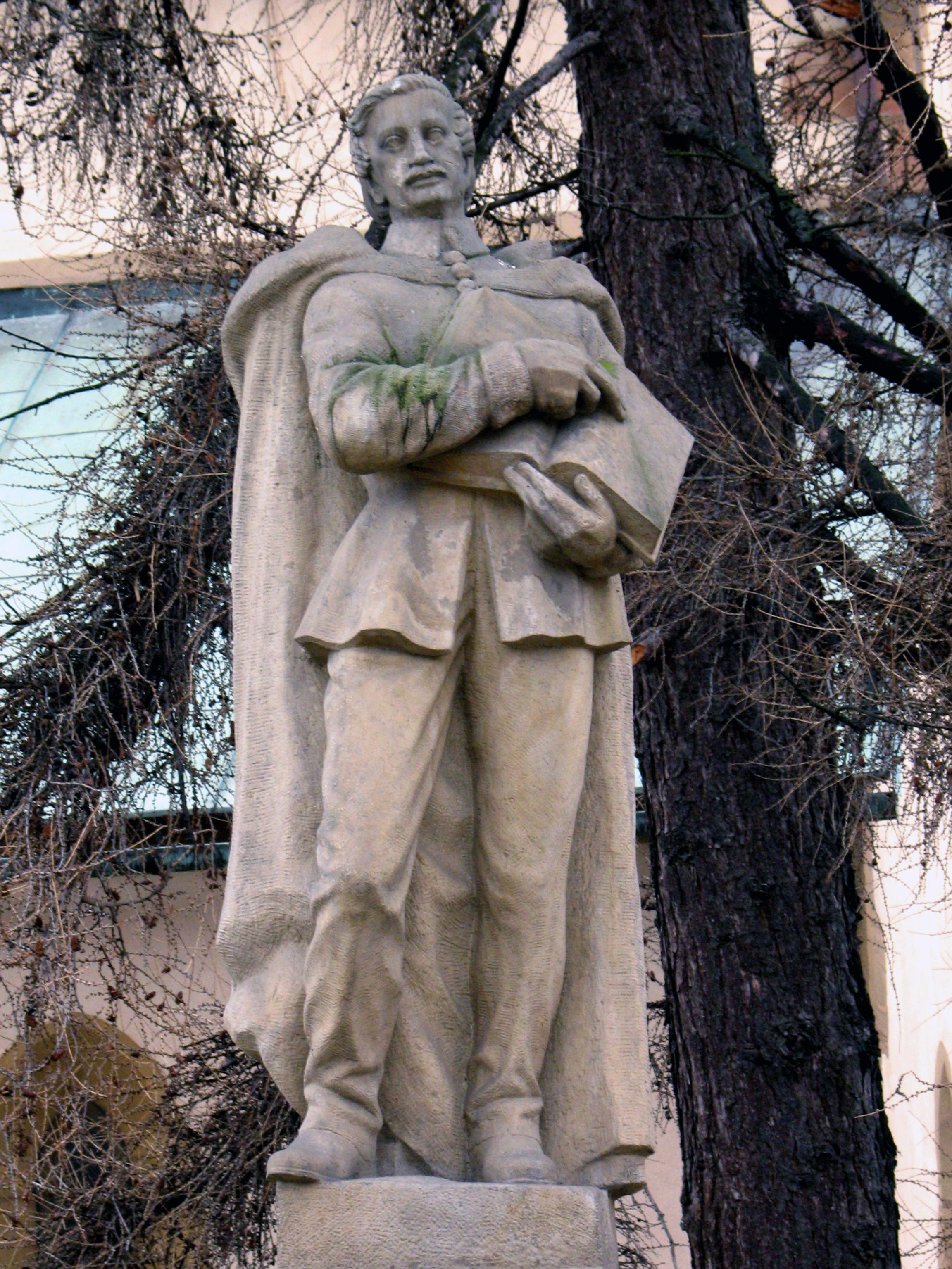 Skulptúra spisovateľa Gašpára Fejerpataký Belopotockého